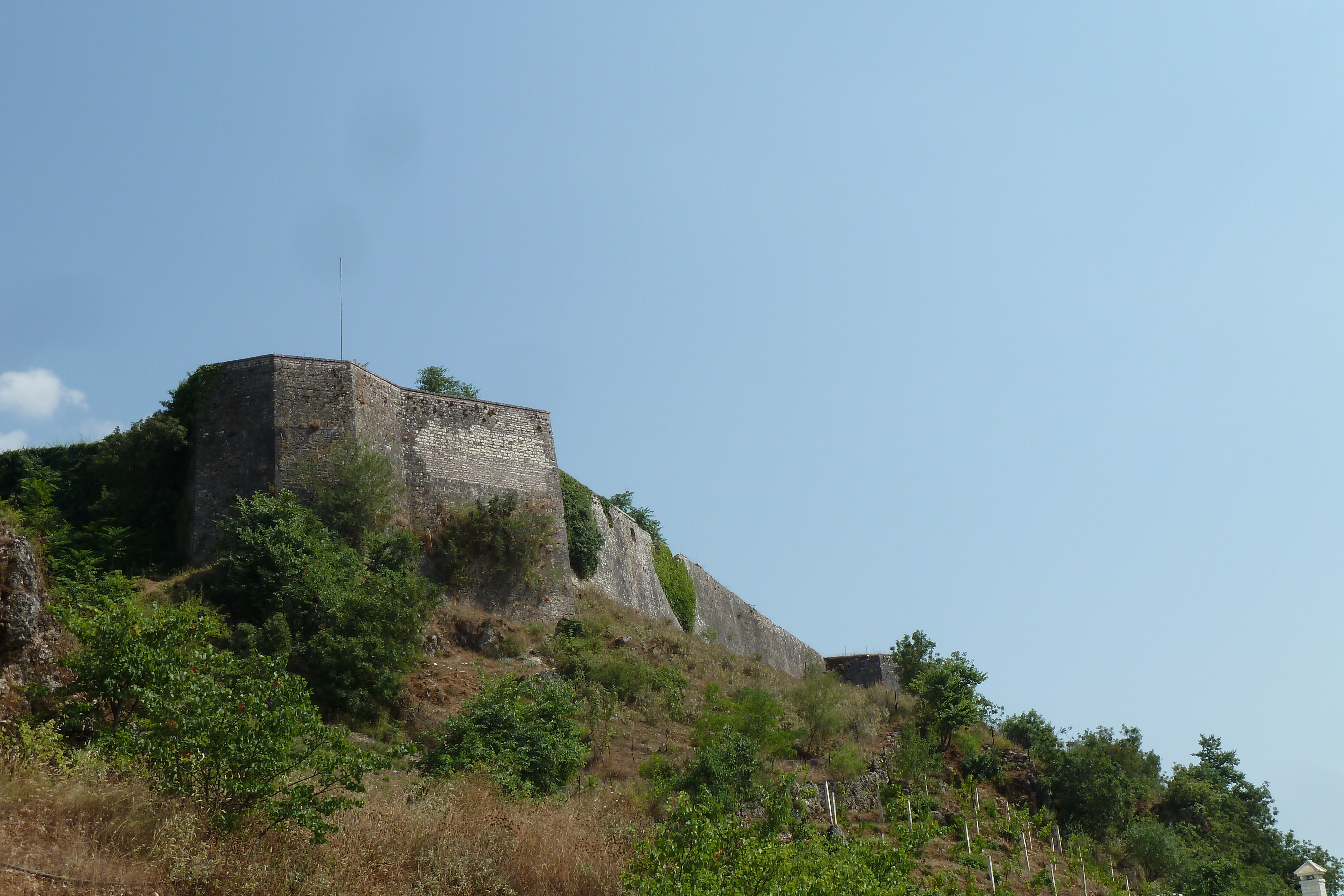 Exterior of the Castle of Libohove (northwest corner) seen from north.